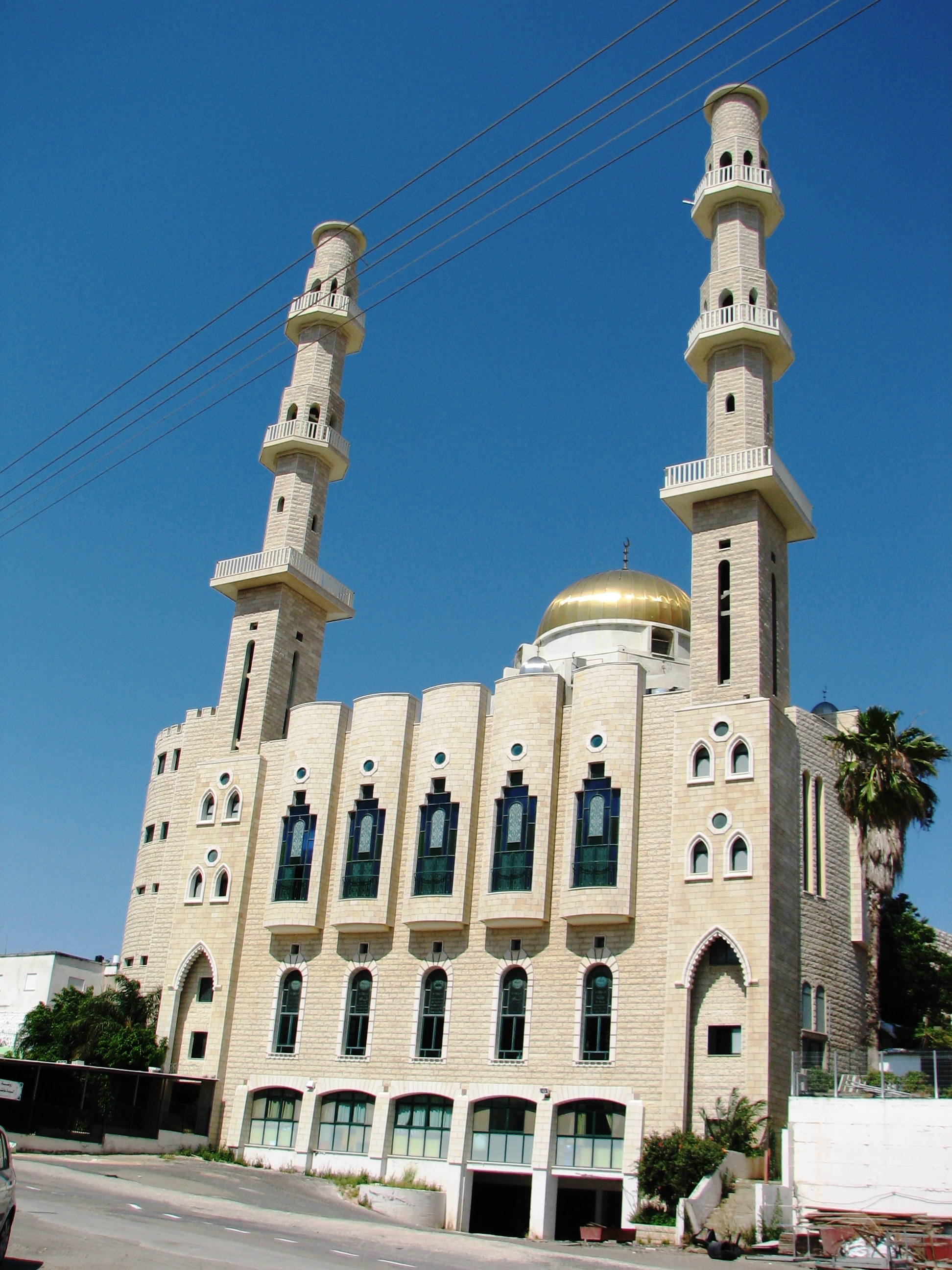 Tur'an, is an Israeli-Arab local council in the North District of Israel. It is located on Mount Tur'an near the main road from Haifa to Tiberias טורעאן, היא מועצה מקומית ערבית במחוז הצפון בישראל. היא הוכרזה כמועצה מקומית בשנת 1959., שוכנת על הר טורעאן על הדרך במובילה מחיפה לטבריה ליד צומת גולני מסגד אבו באקר סדיק שנבנה בשנת 2003